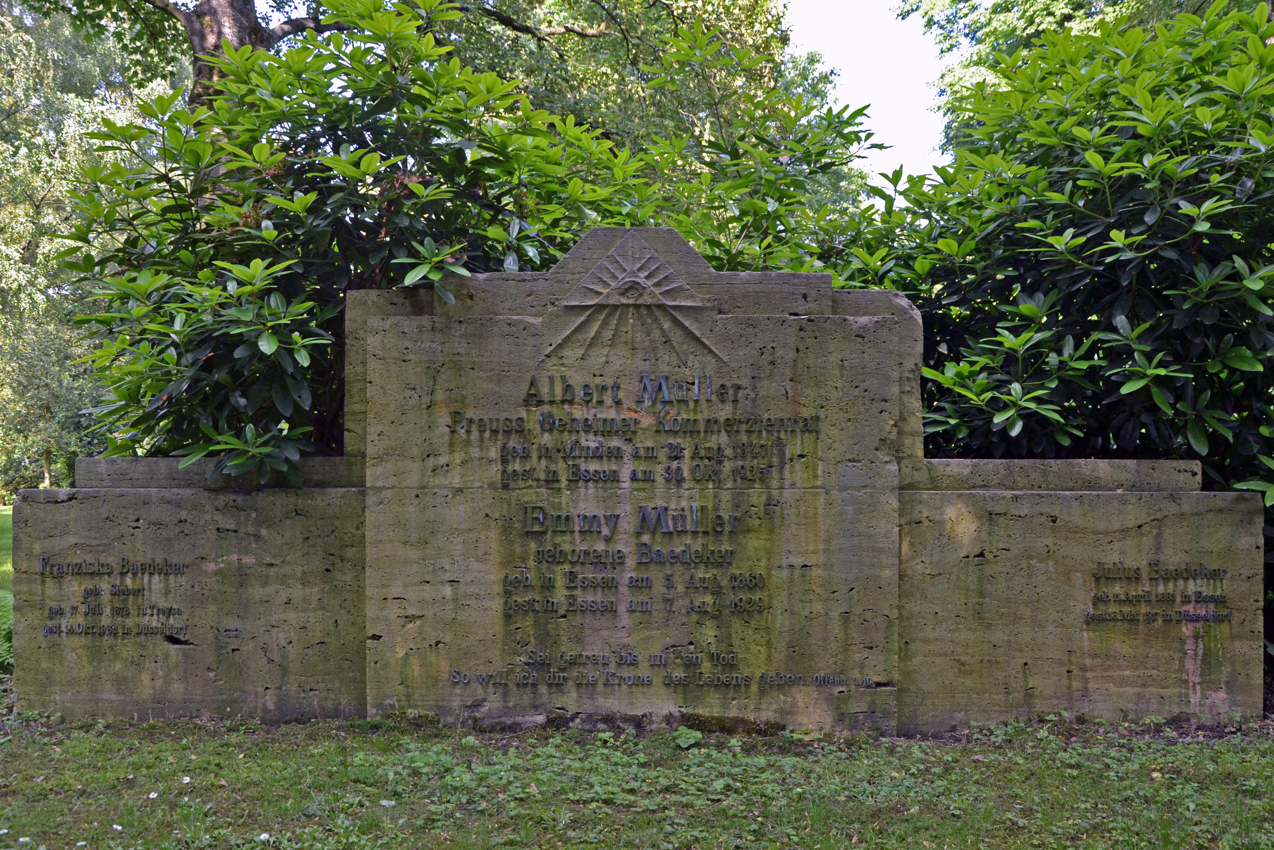 Grabmal auf dem historischen Gräberfeld des Essener Ostfriedhofs, in den 1950er Jahren vom geschlossenen Friedhof am Kettwiger überführt